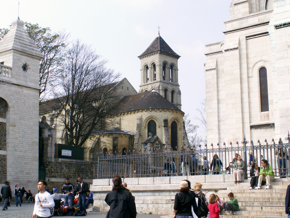 vue du Sacré-Coeur